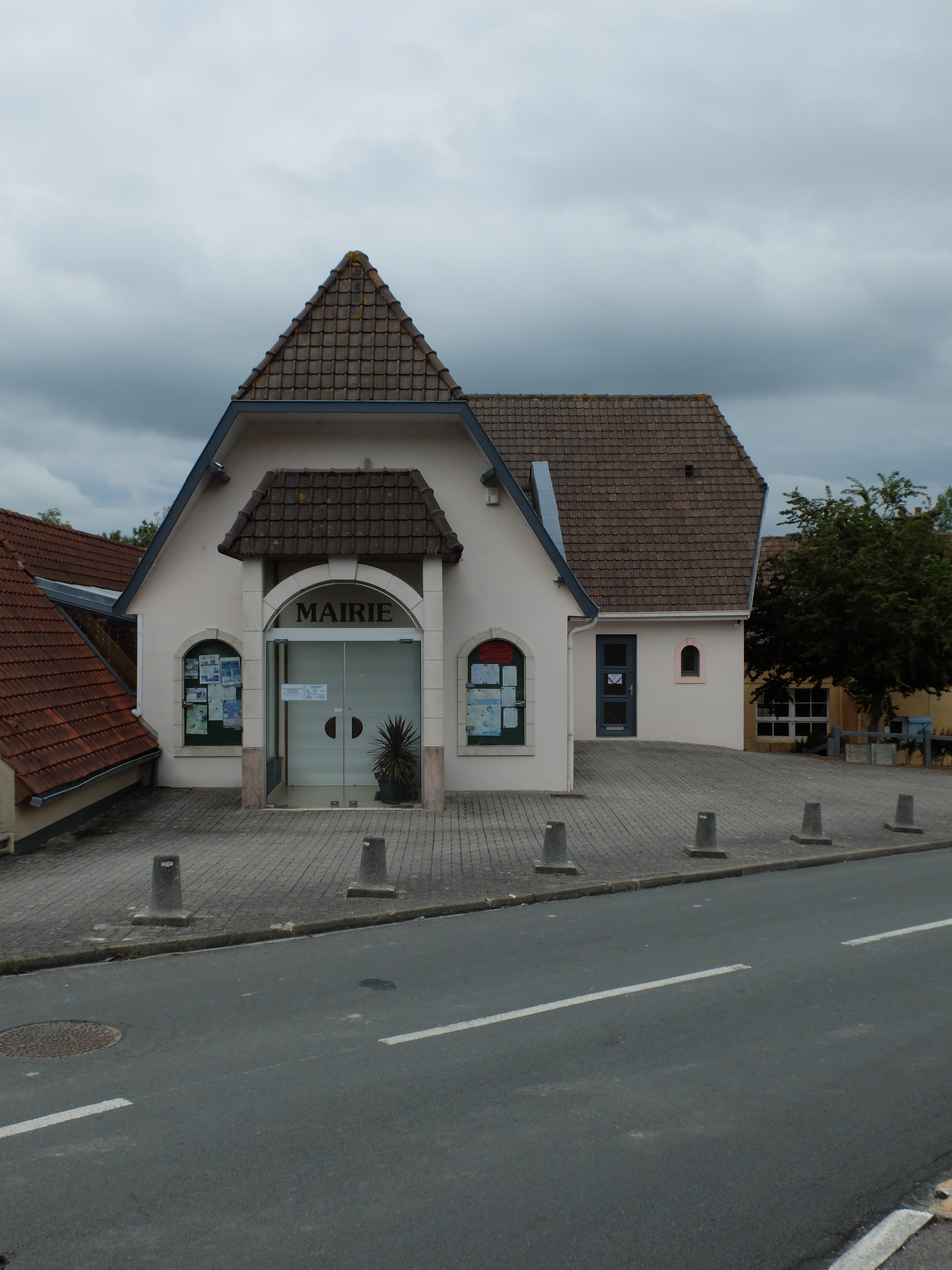 Vue de la mairie de Nesles.